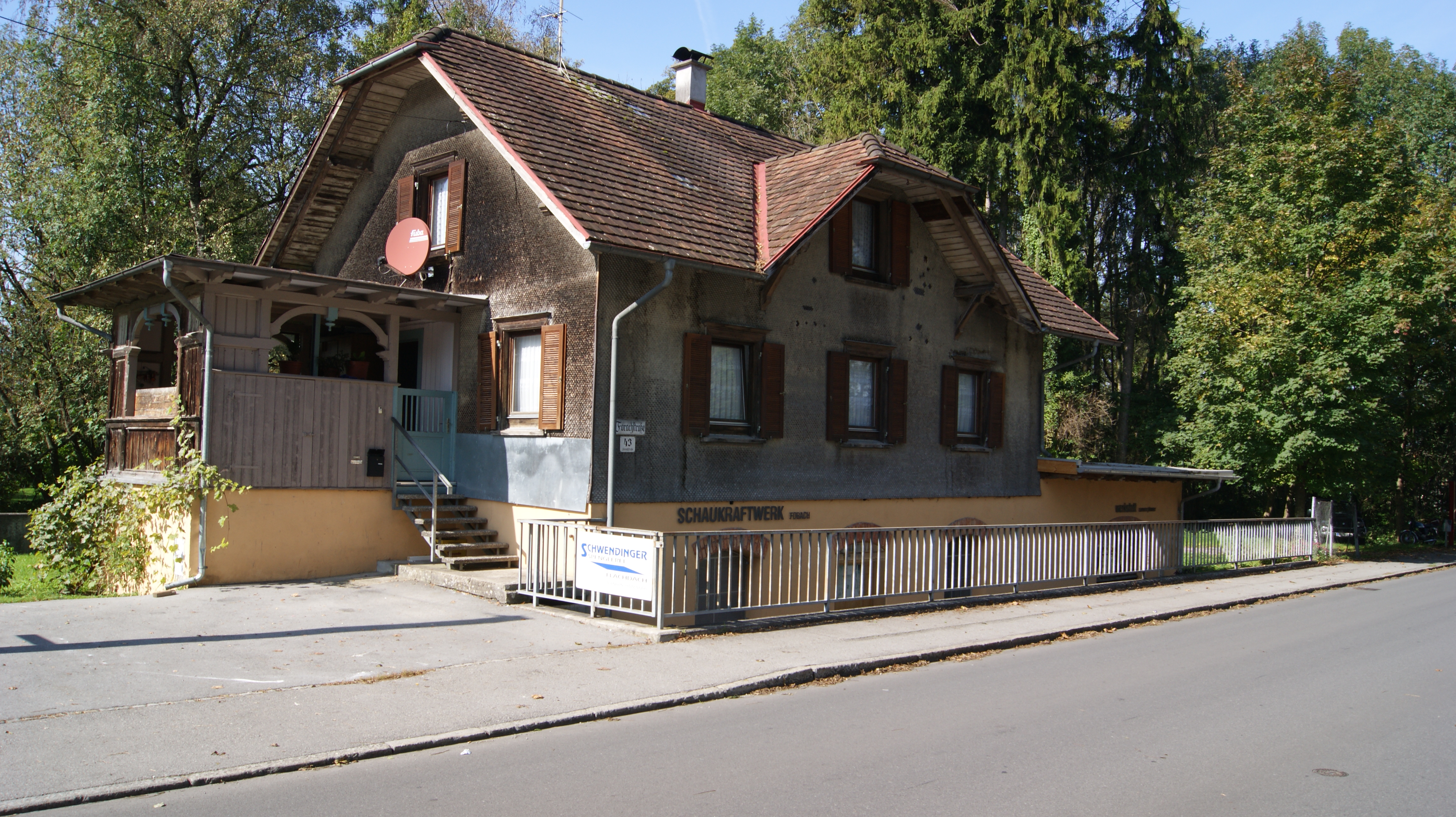 Schaukraftwerk Forach (Dornbirn, Vorarlberg, Österreich, Blick von Südosten.